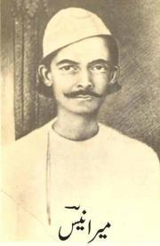 Famous urdu poet Mir Anees